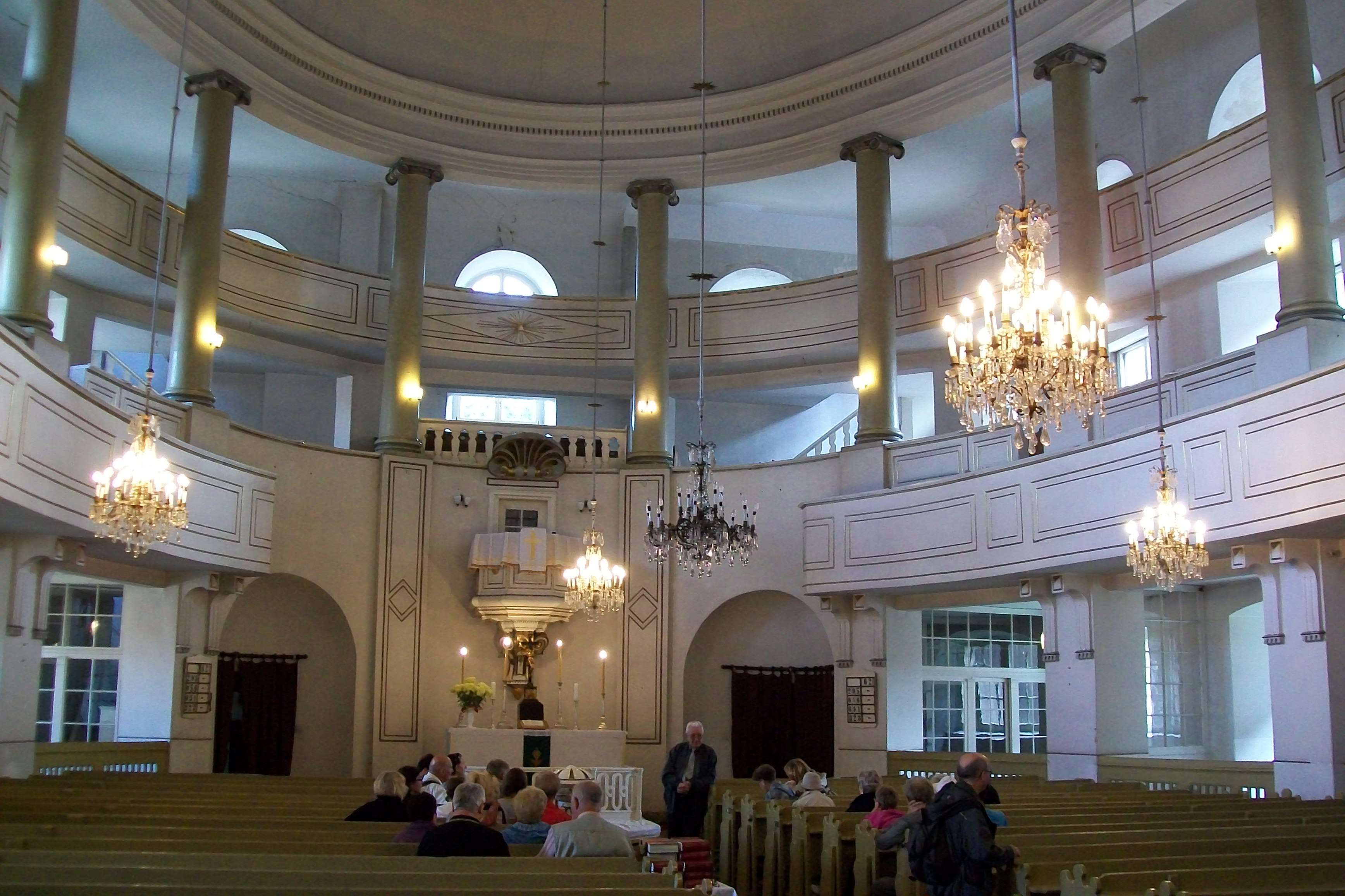 Inneres der evangelischen Stadtpfarrkirche von Wałbrzych (Waldenburg) / Polen.